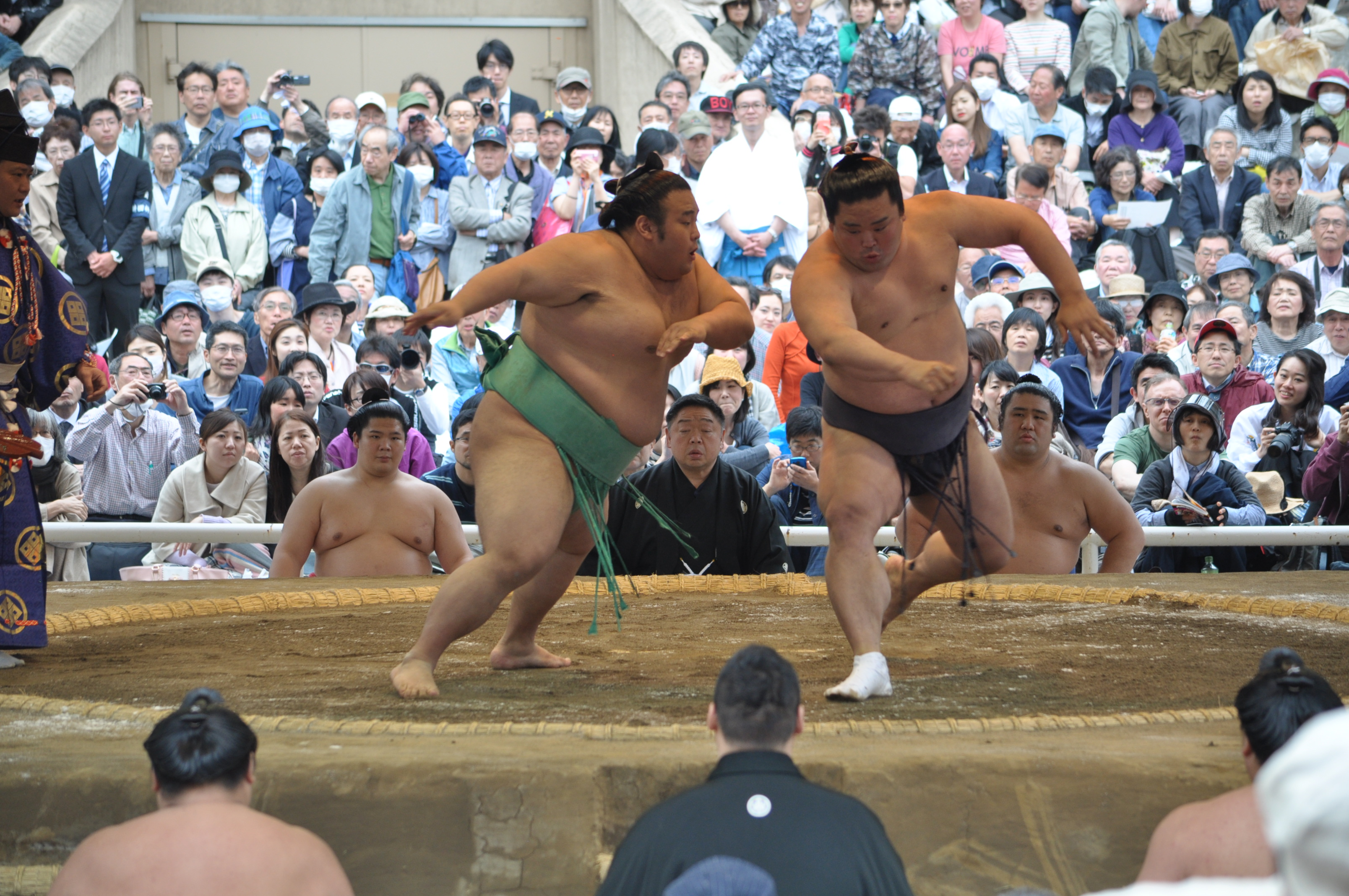 妙義龍 泰成